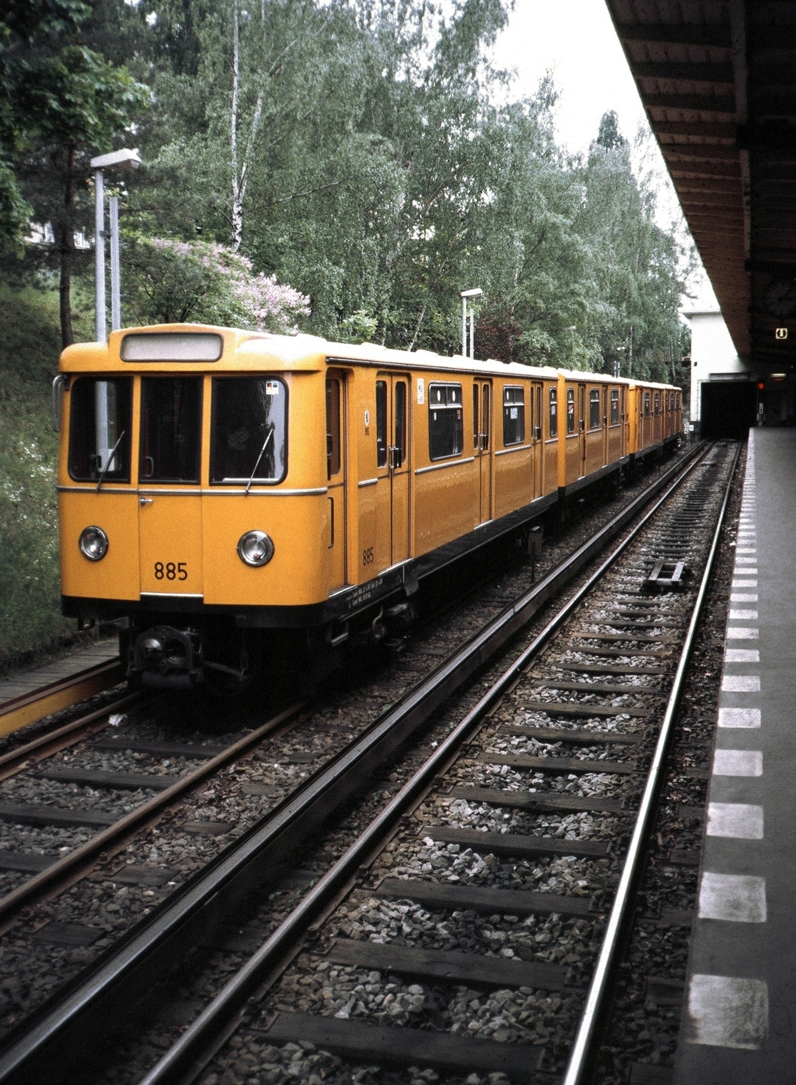 Bauart A3L mit Zierleiste in Krumme Lanke